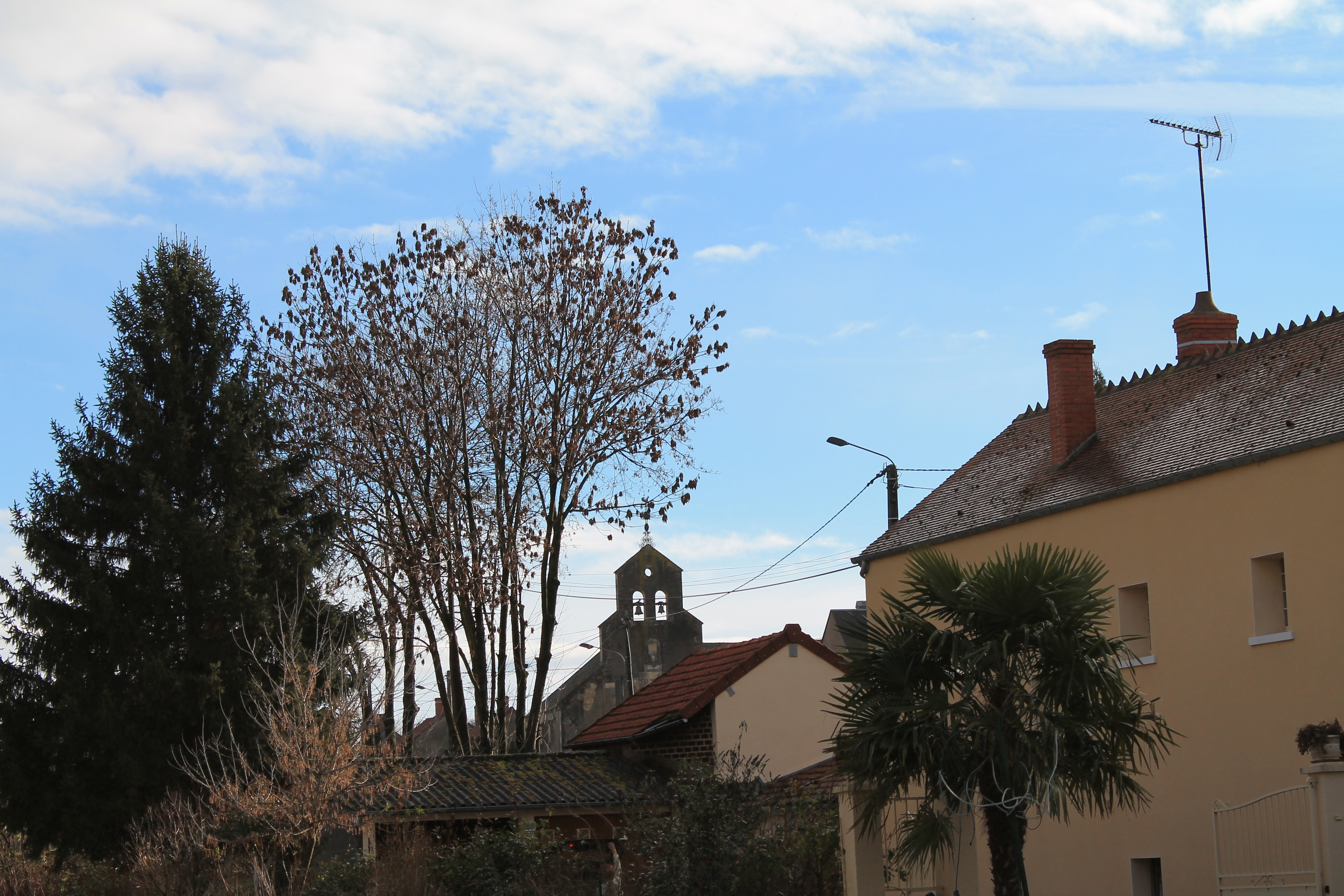 Vue de Grossouvre, avec l'église